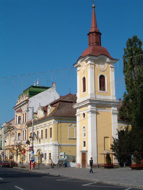 Turnul Francis-rendiek, Târgu Mureş